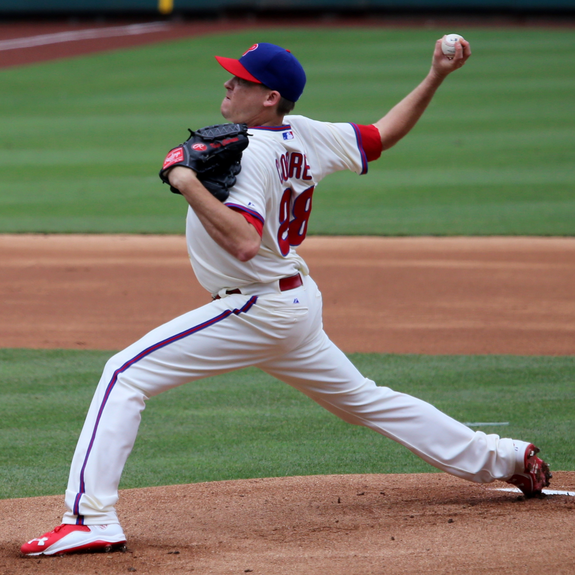 Kevin Correia